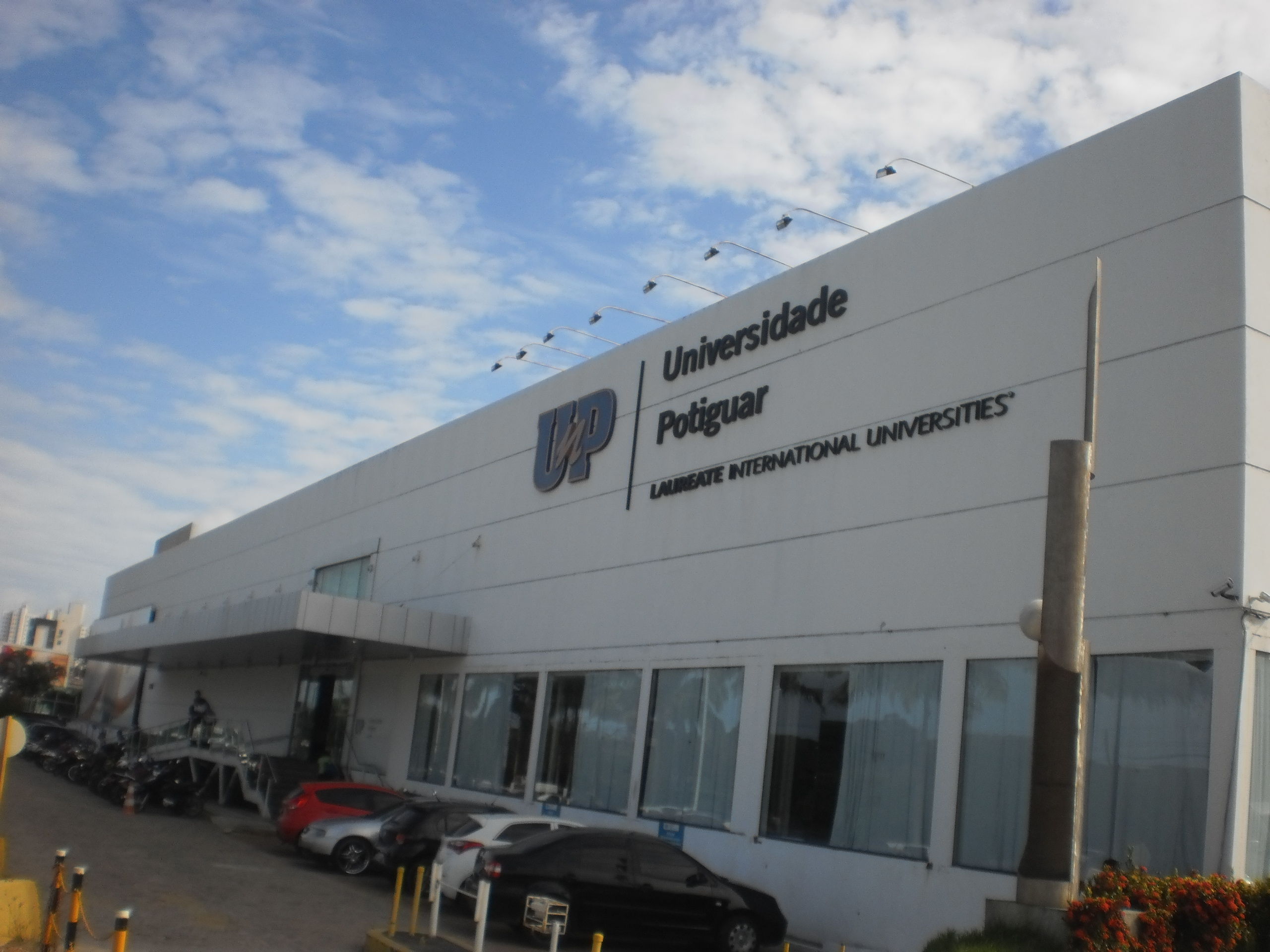 Universidade Potiguar (UnP), Capim Macio, Natal, Rio Grande do Norte, Brasil.